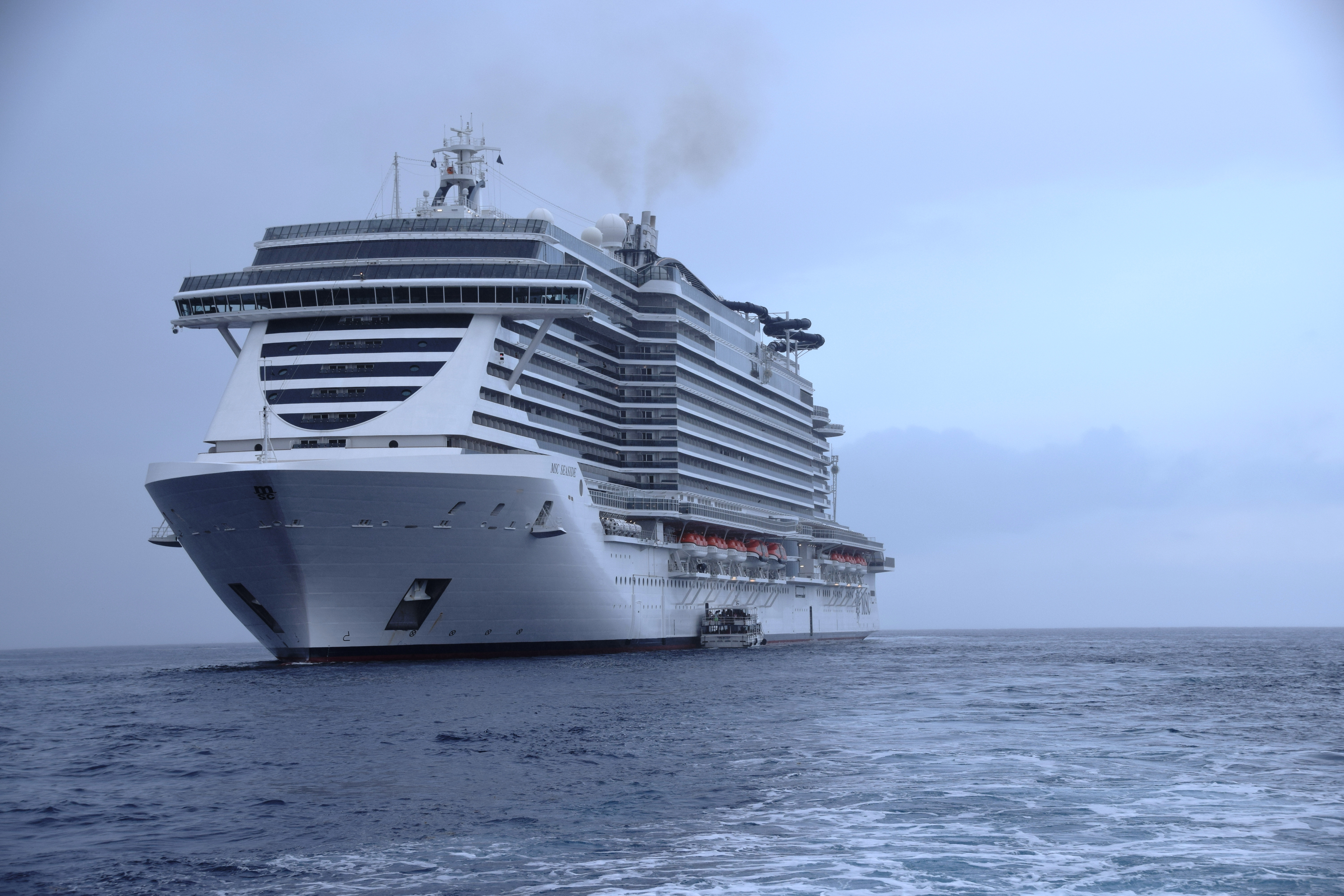 MSC Seaside